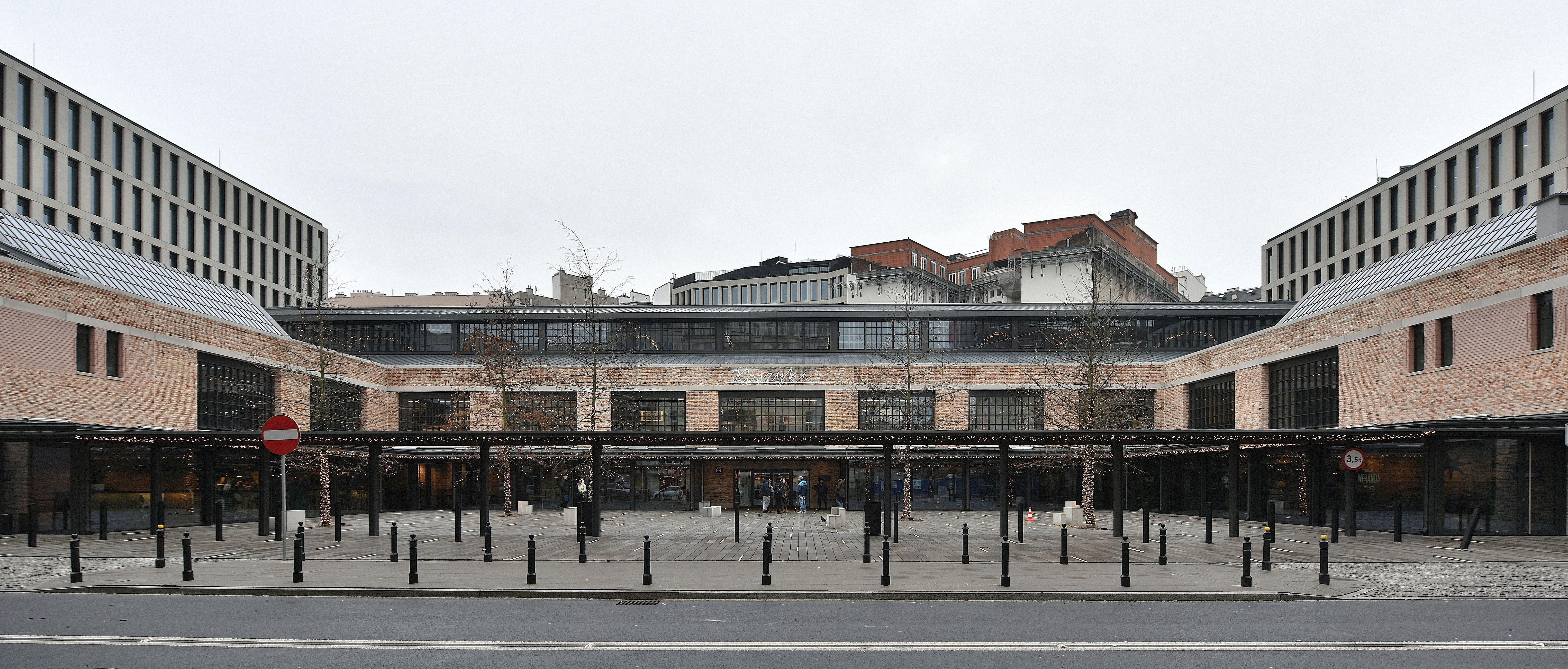 Hala Koszyki od strony ul. Koszykowej